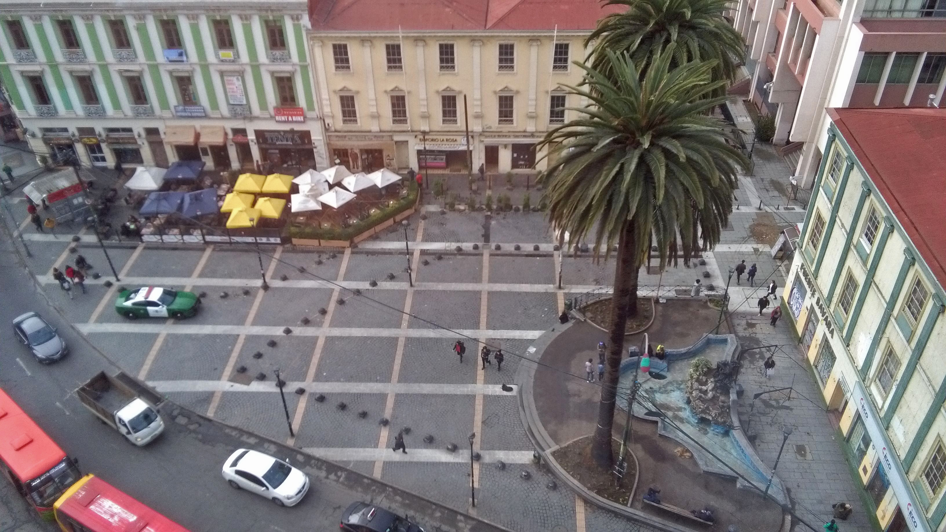 Plaza Aníbal Pinto Valparaíso, Chile